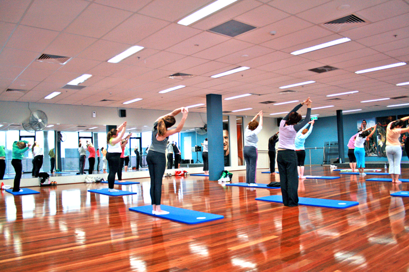 Yoga Class at a Gym